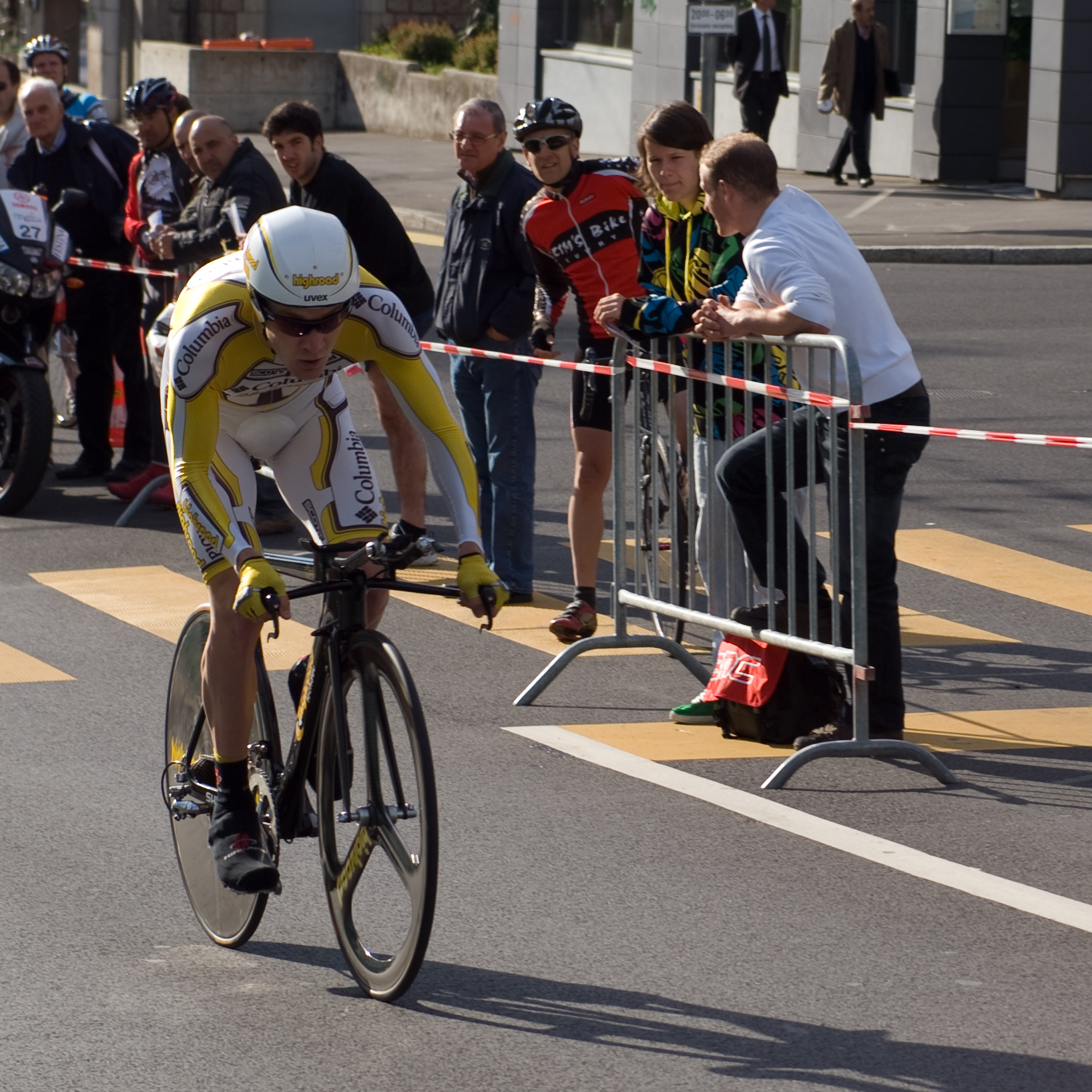 Craig Lewis au Tour de Romandie 2009 - prologue